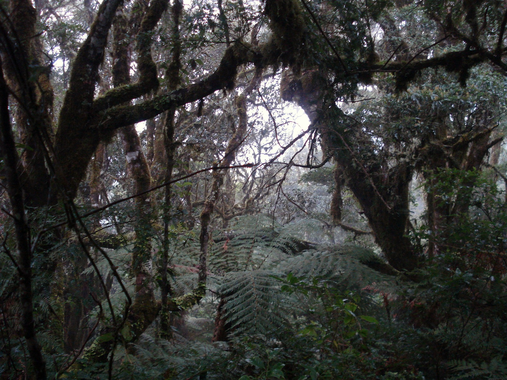 vista del bosque nuboso pluvial del parque Nacional Amboró, en el departamento de Santa Cruz, Bolivia.